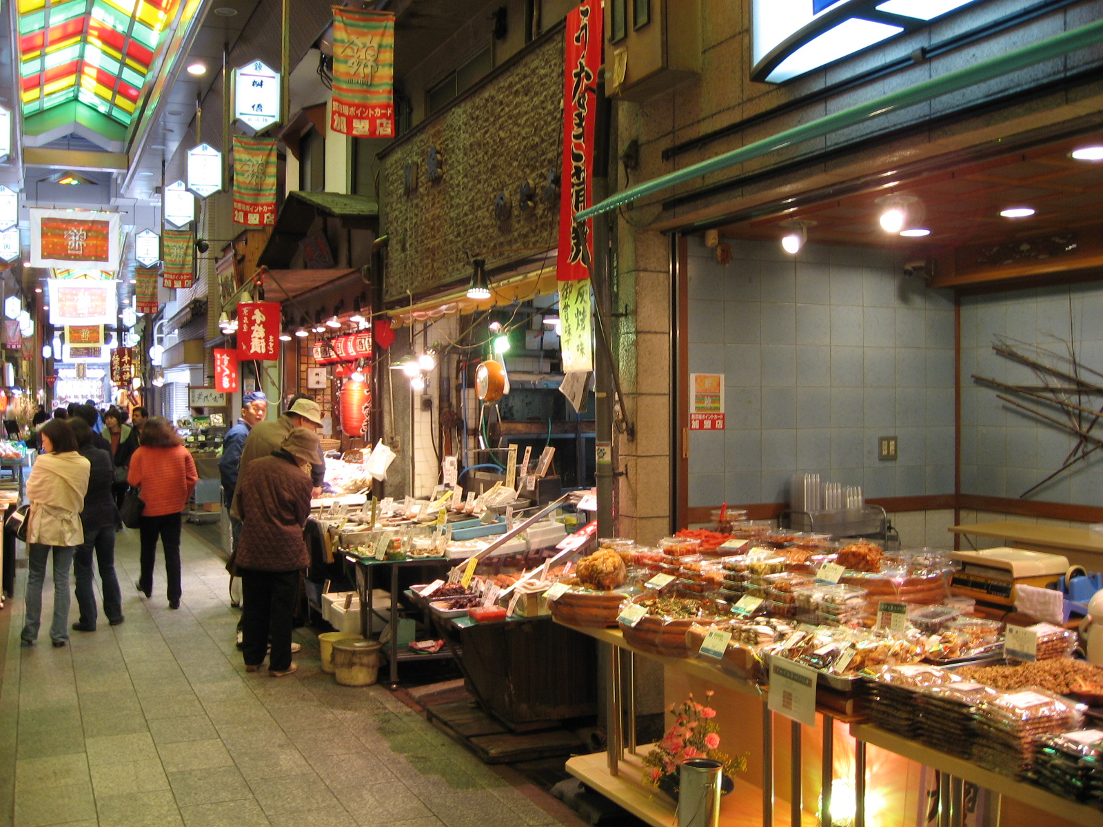 錦市場（京都市中京区錦小路通御幸町西入ル鍛冶屋町、手前から菓子・焼き芋「七榮」[1]、川魚・うなぎ「のとよ」[2]付近）うなぎ